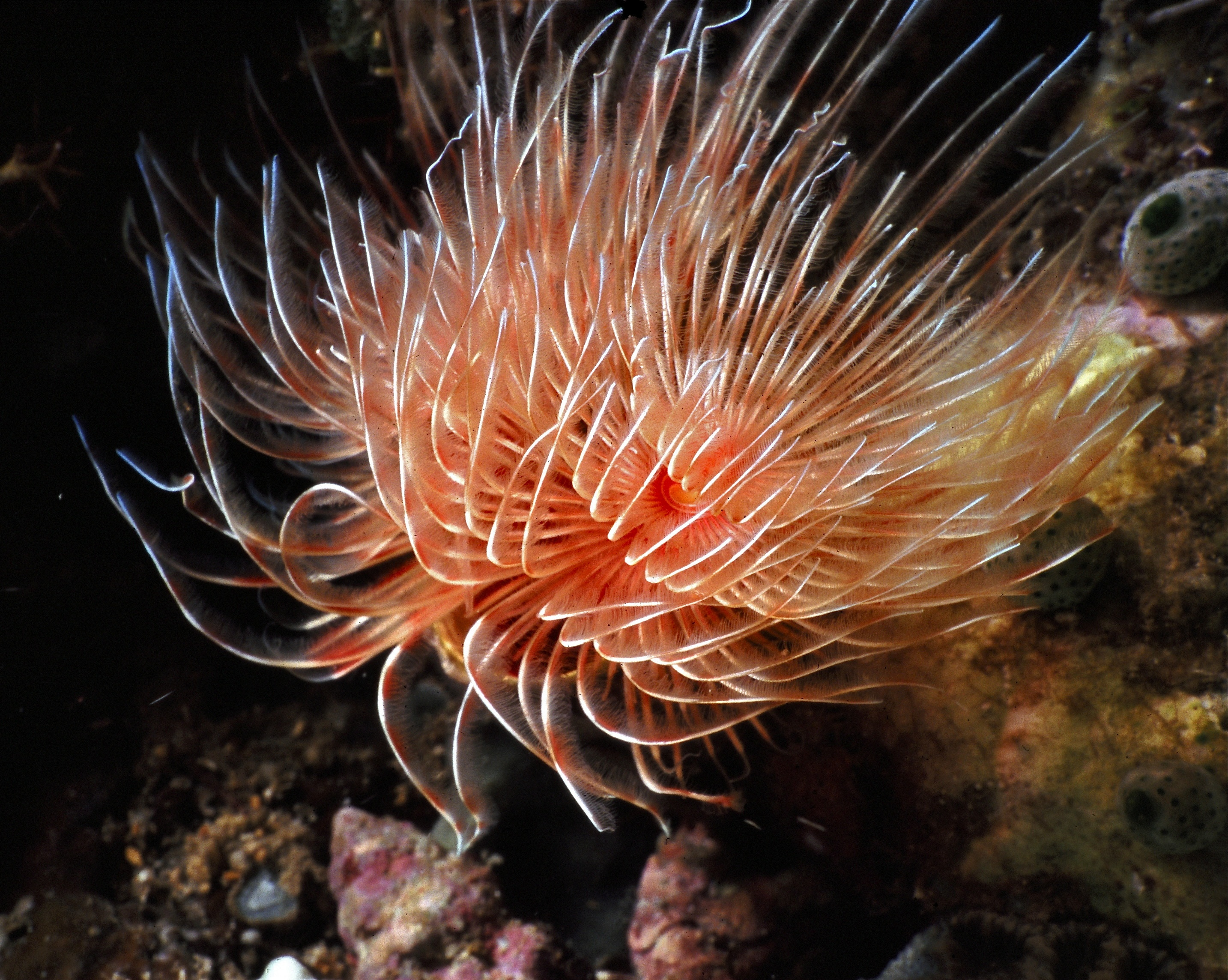 Bunaken, Sulawesi, INDONESIA